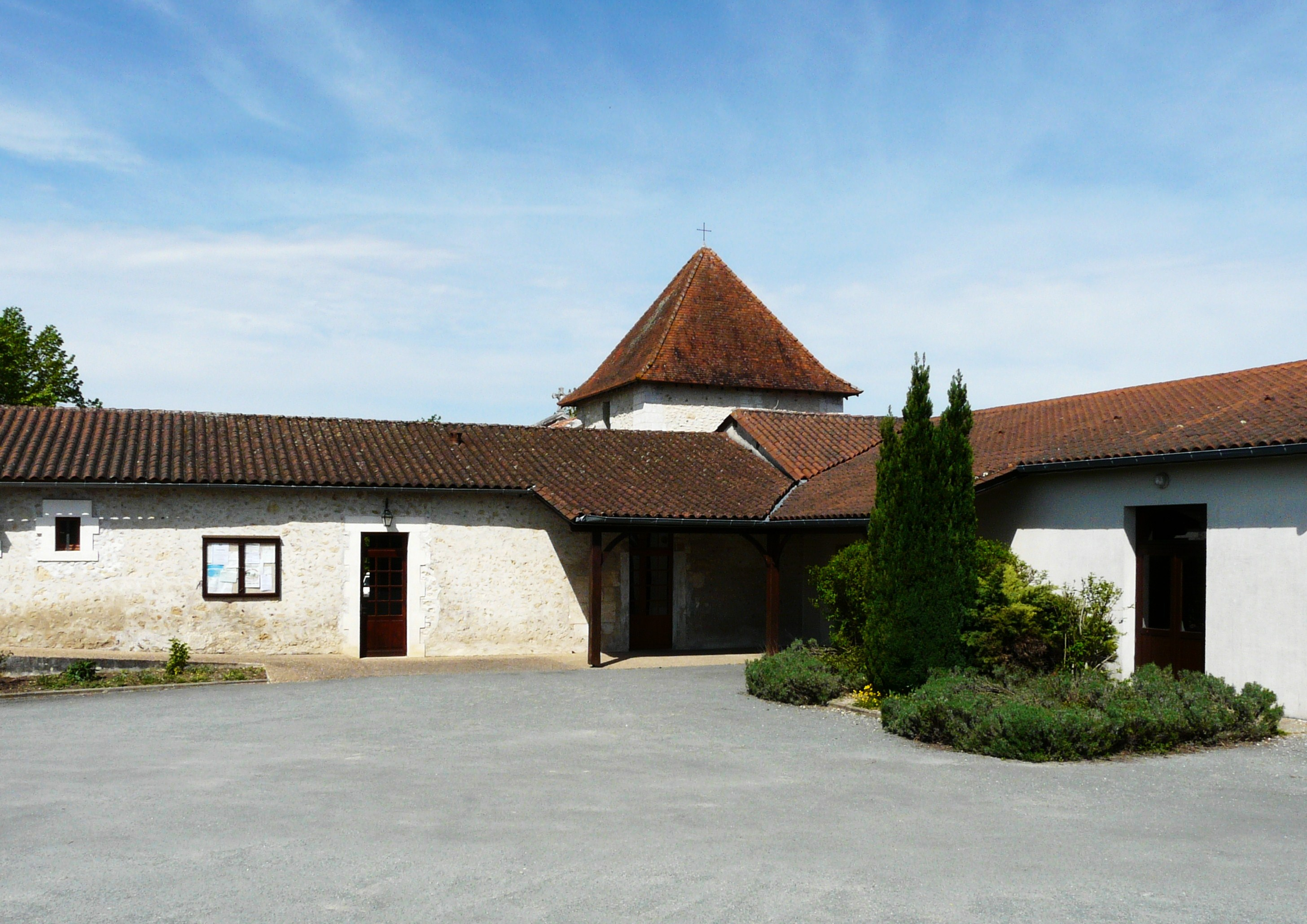 Mairie de Sencenac-Puy-de-Fourches